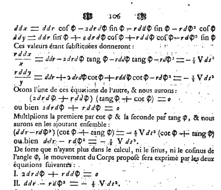 Euler Coriolis Beschleunigung 1747